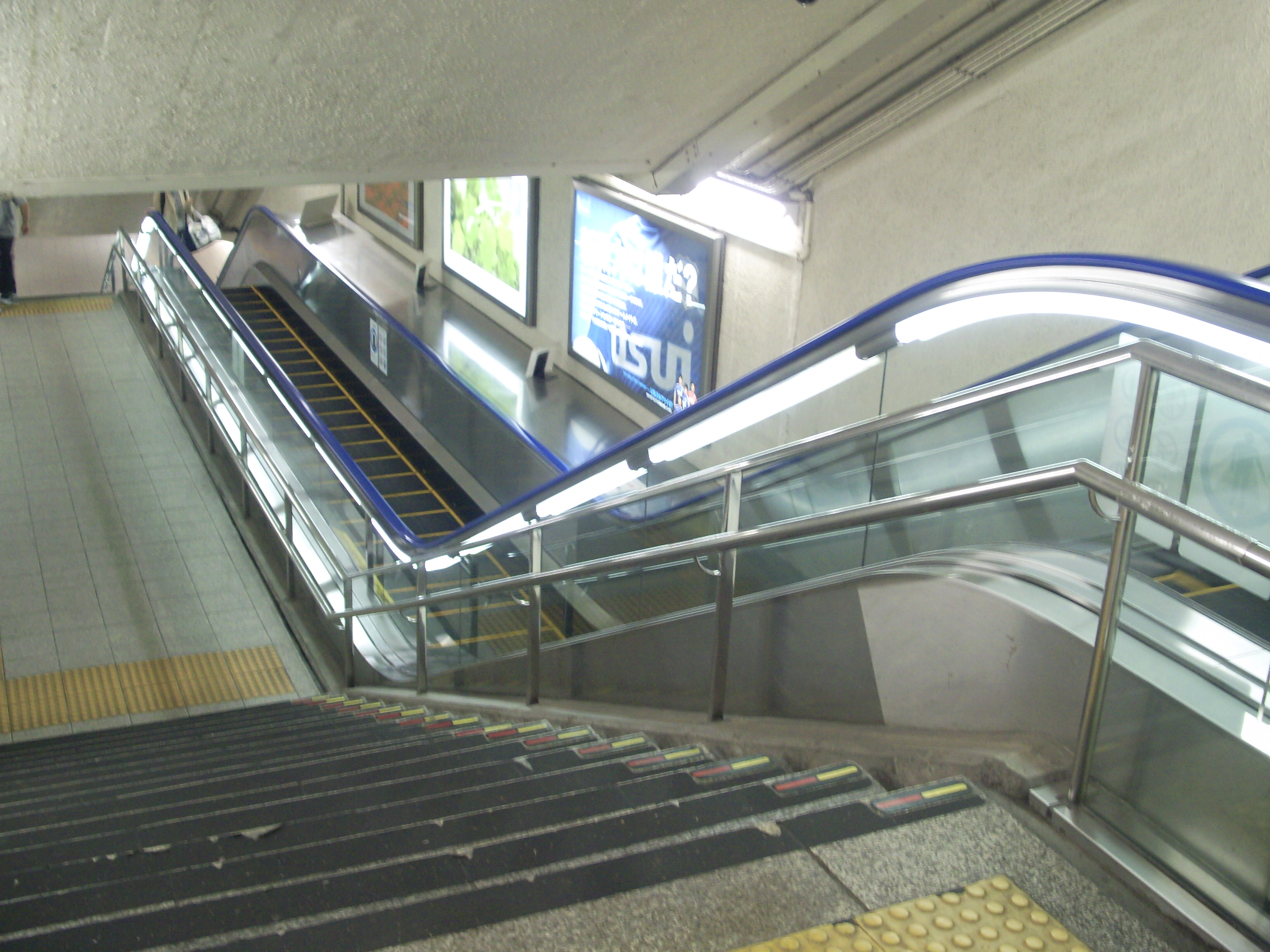 三島駅内の平面付き二段階エスカレーター「オートウォーク」 ㊟カメラを起動すると日付機能が出荷時のものに初期化されるため、ファイル履歴の投稿日時とメタデータの原画像データの生成日時が異なります（本概要欄の下記日付が撮影日）